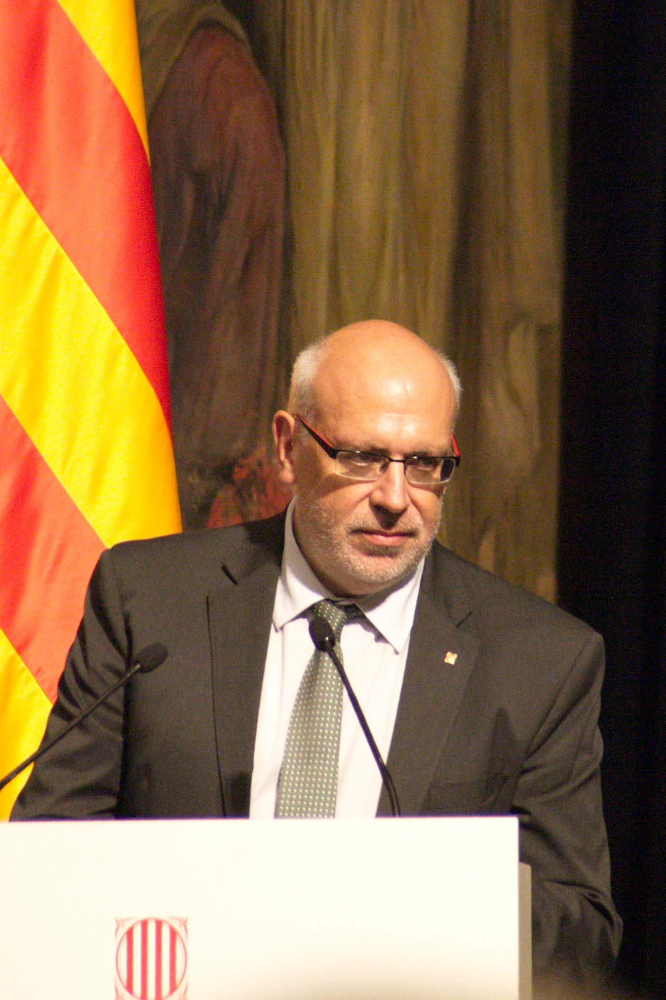 Jordi Baiget i Cantons, secretari del govern de la Generalitat de Catalunya, a l'acte de lliurament de la Medalla d'Or de la Generalitat de Catalunya a Jordi Savall. Barcelona, 17-10-2014